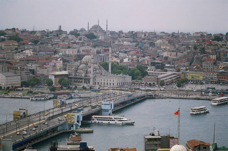 Az Aranyszarv-öblön átívelő Galata híd látható.